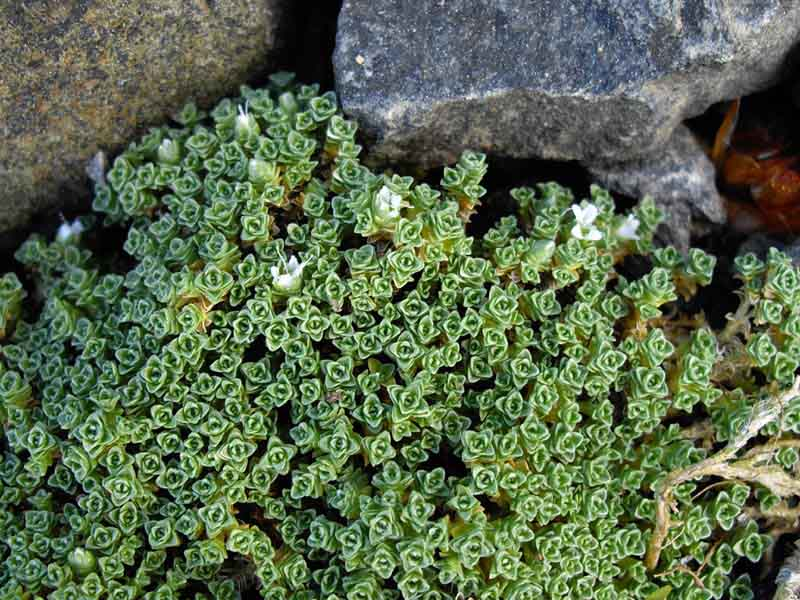 Arenaria tetraquetra subsp. amabilis